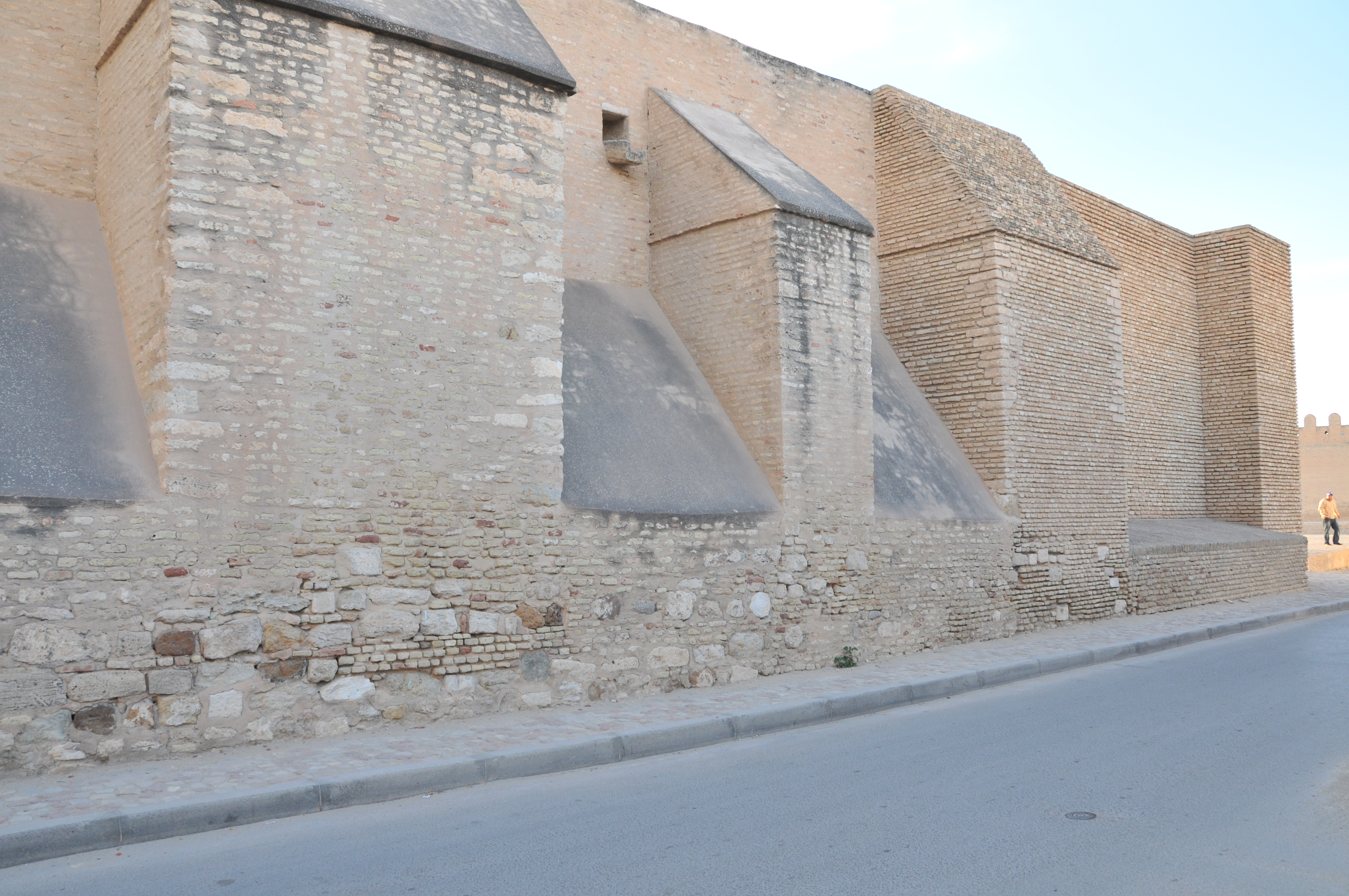 Mur et contreforts à toit en pente du côté oriental (ou Est) de la Grande Mosquée de Kairouan, également appelée mosquée Oqba Ibn Nafi, en Tunisie.